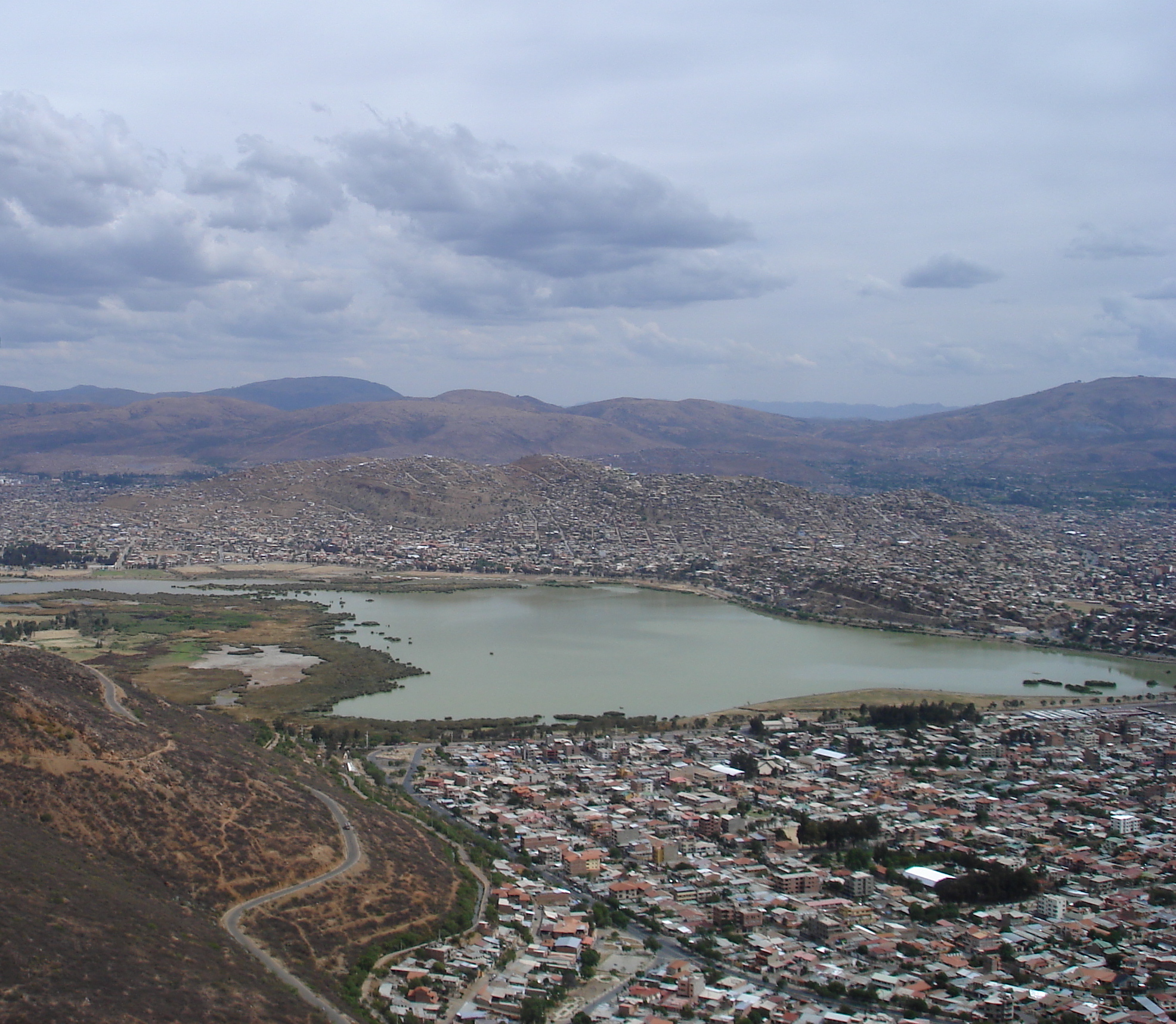 Panorama de la laguna Alalay y la ciudad de Cochabamba